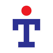 Logo